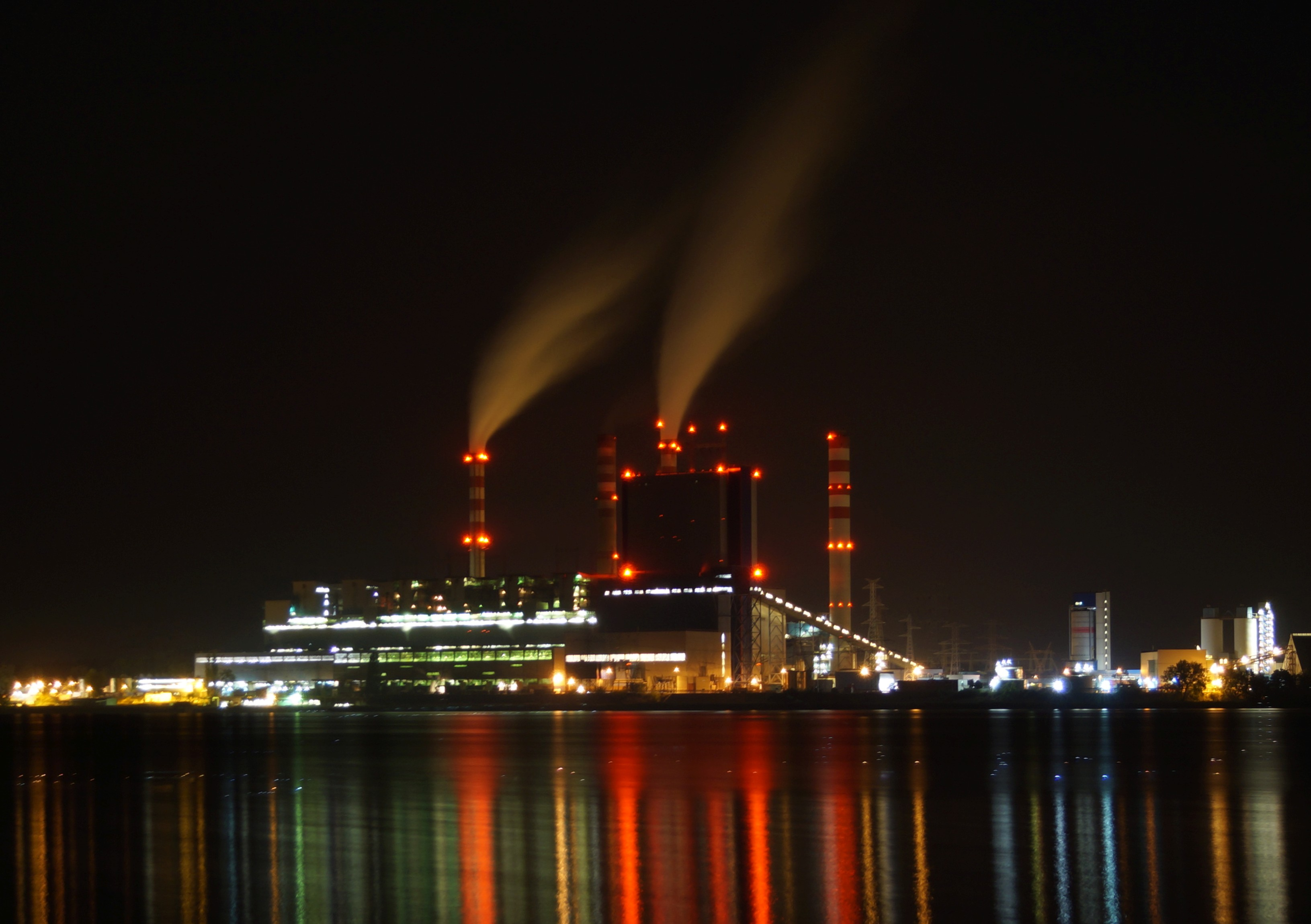 Elektrownia Pątnów widziana zza jeziora Gosławskiego (Konin, Gosławice)